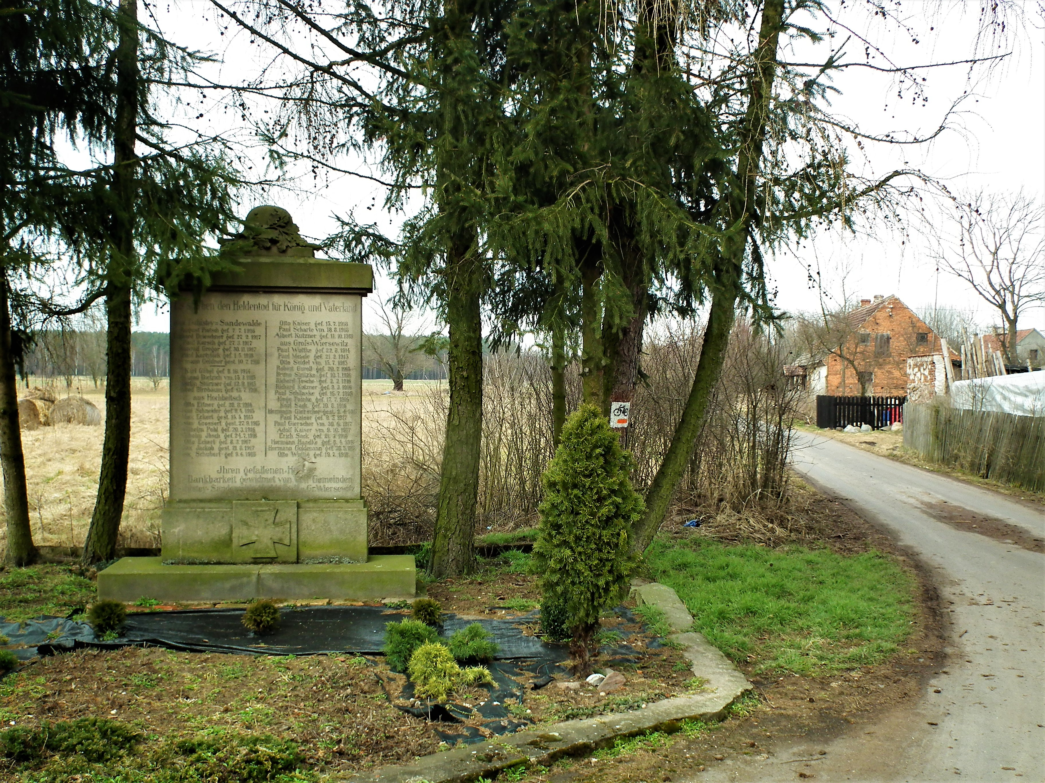 Sądowel - część Lechitowa.